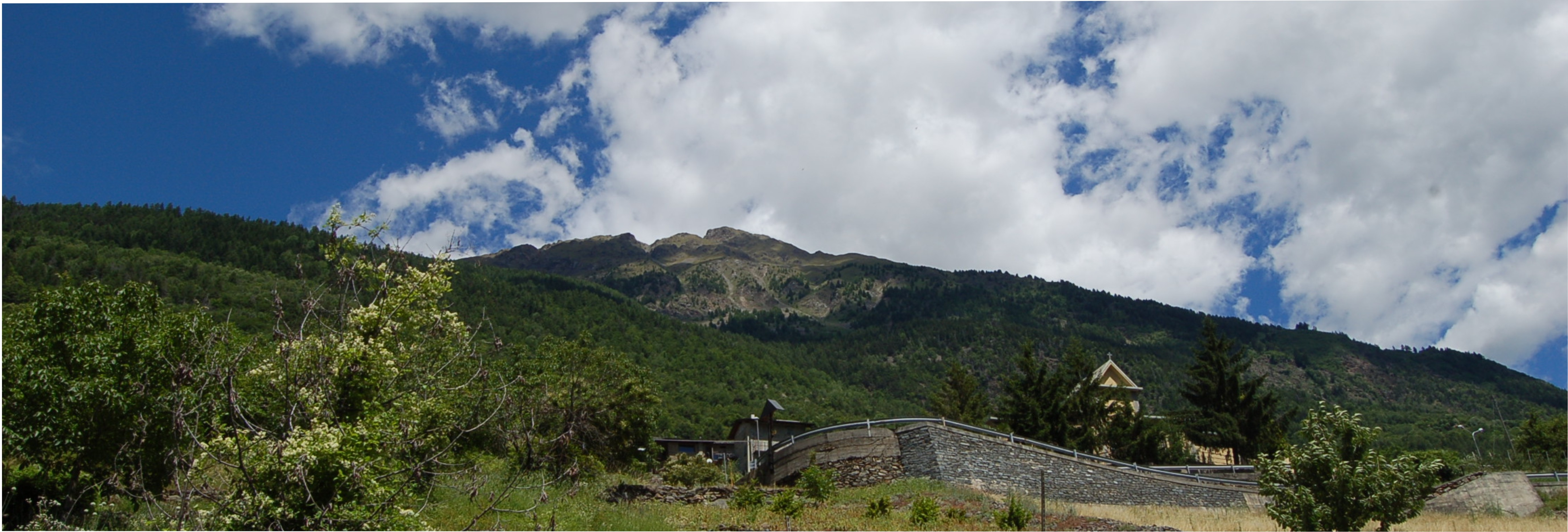 BARUFFINI TIRANO (so) VISTA DEL MONTE MASUCCIO